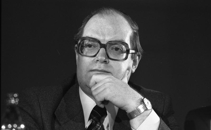 27. Bundesparteitag der F.D.P in Frankfurt am Main